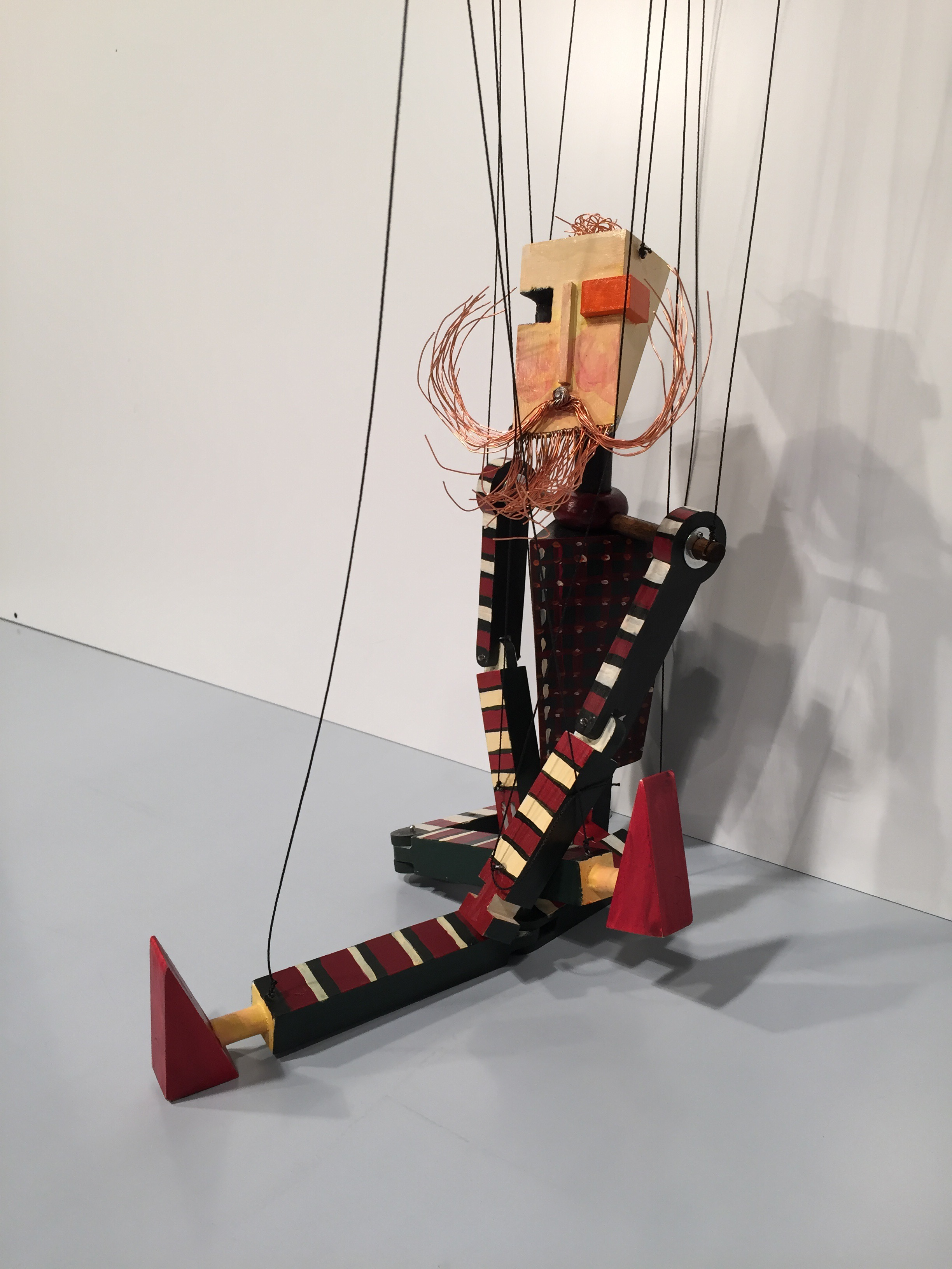 Nachbau (2015) der am Bauhaus gefertigten Marionette "Der Schneider". Original Gestaltung von Kurt Schmidt, Ausführung von Toni Hergt, 1923. Ansicht seitlich im Sitzen.